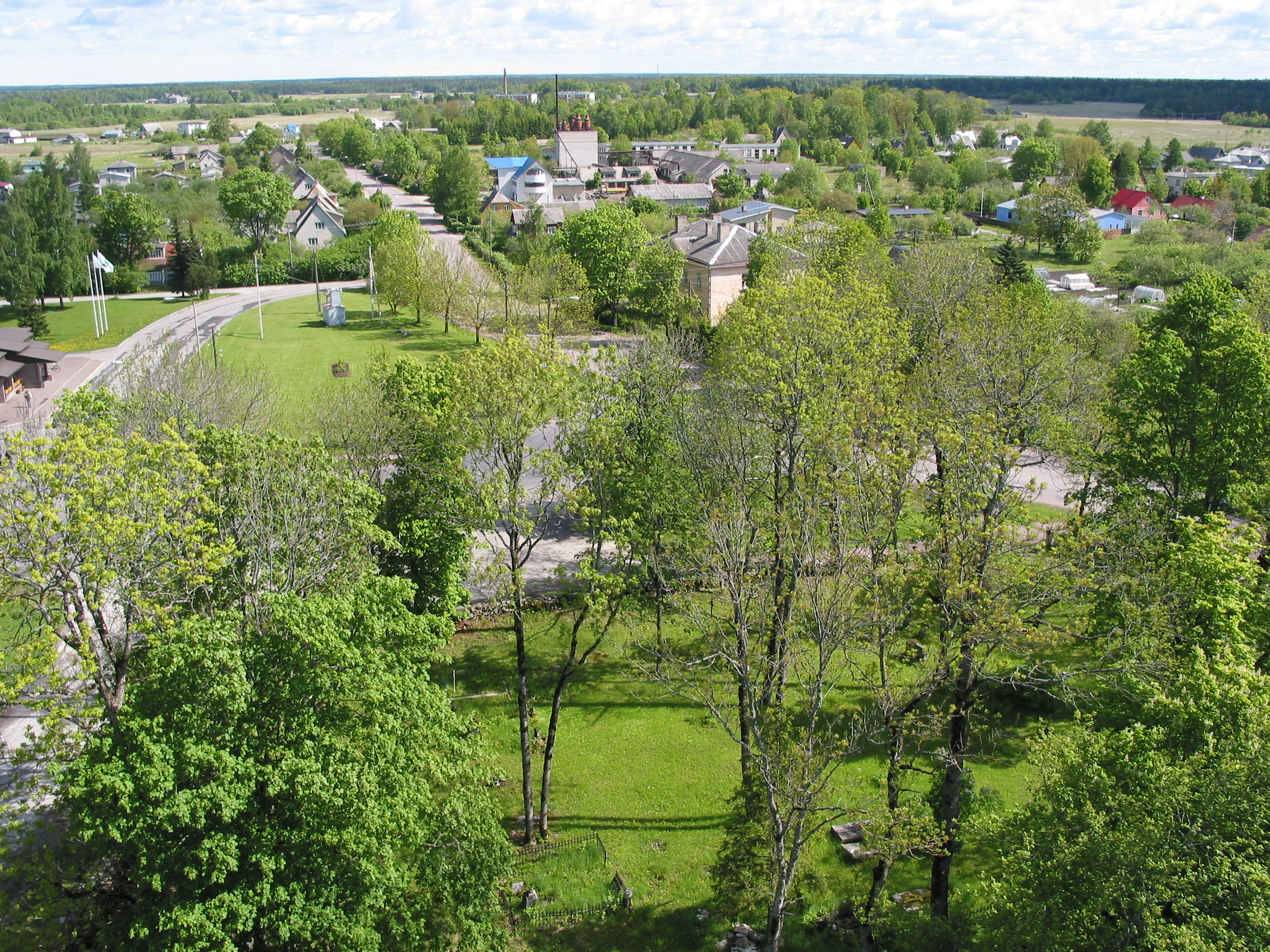 Vaade Märjamaa kiriku tornist.